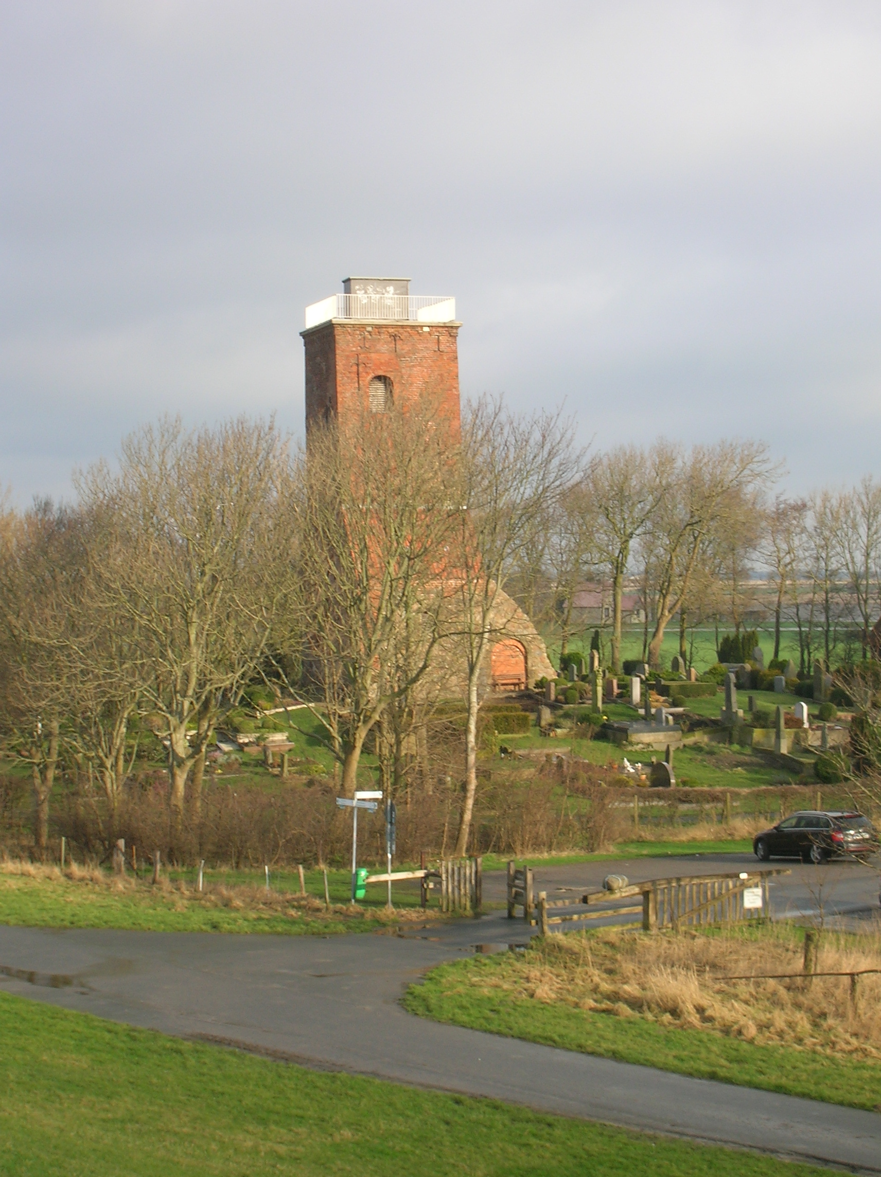 Ochsenturm mit altem Kirchfriedhof in Imsum aus Südsüdwest